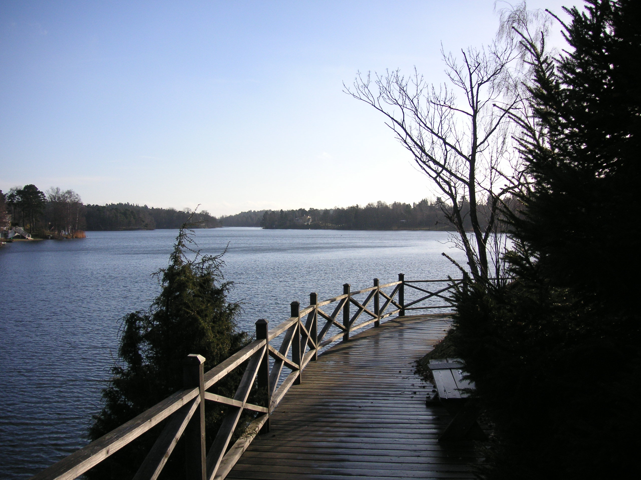 Långsjön mellan Huddinge och Stockholm